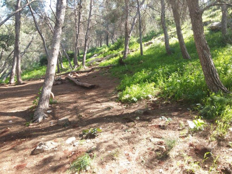 ערוץ נחל יצפור, גלבוע, Itzpor Valley, Gilboa, Israel